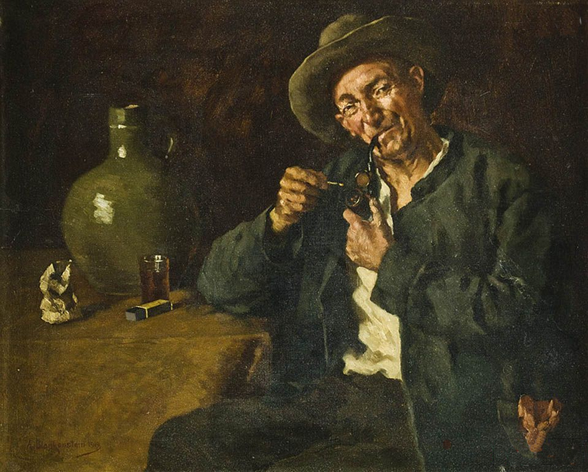 Der Pfeifenraucher